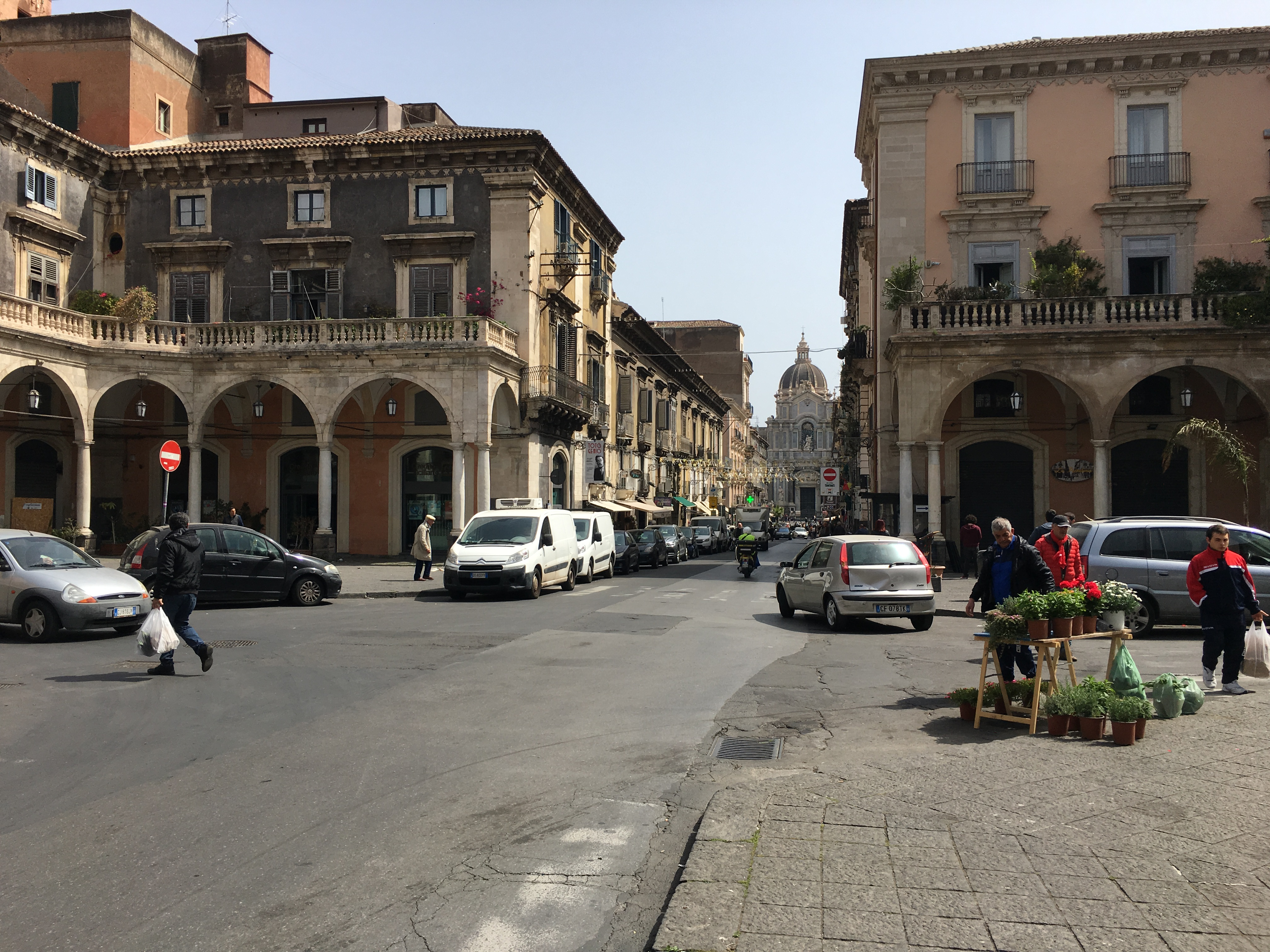 Una parte della piazza